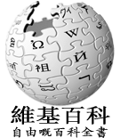 yue Wikipedia Logo